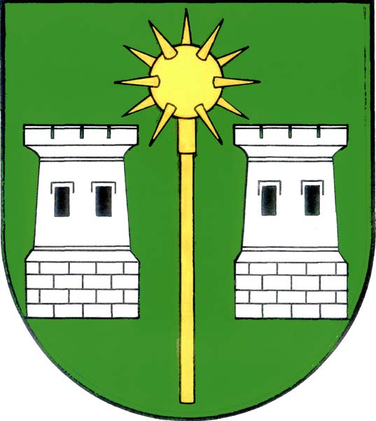 Znak obce Věžky (okres Kroměříž)